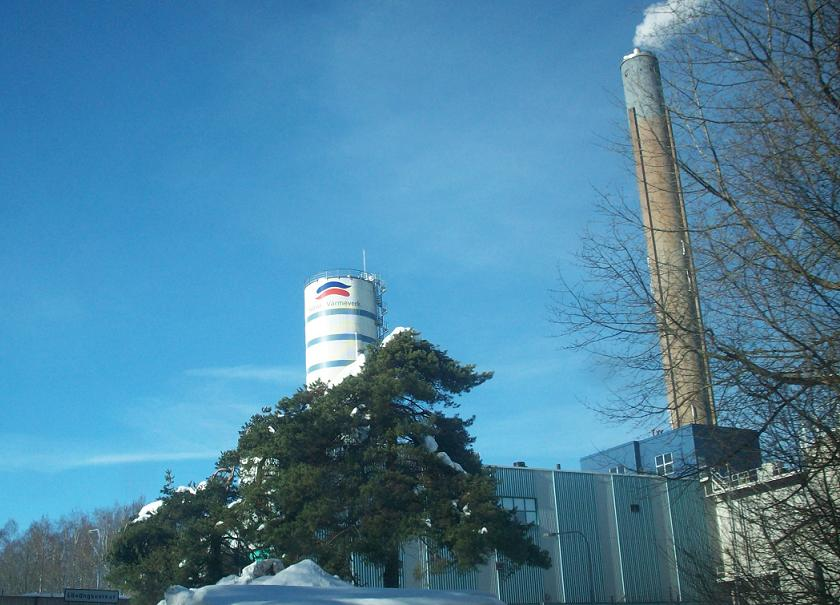 Lövänsverket i Skövde